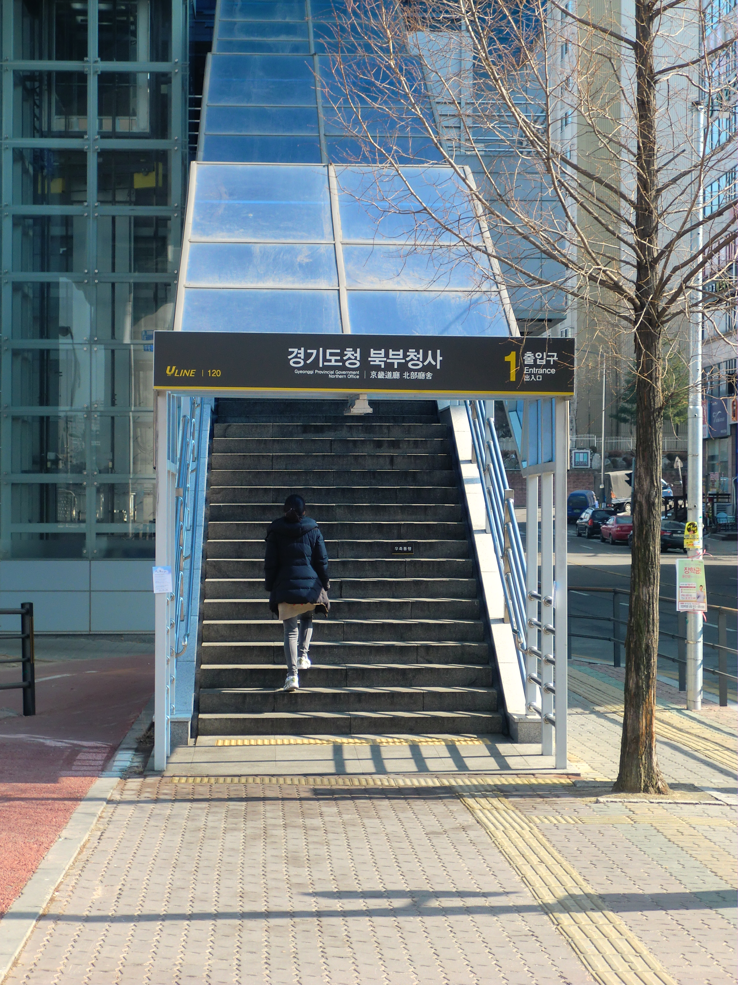 경기도 의정부시에 있는 경기도청북부청사역 1번출구